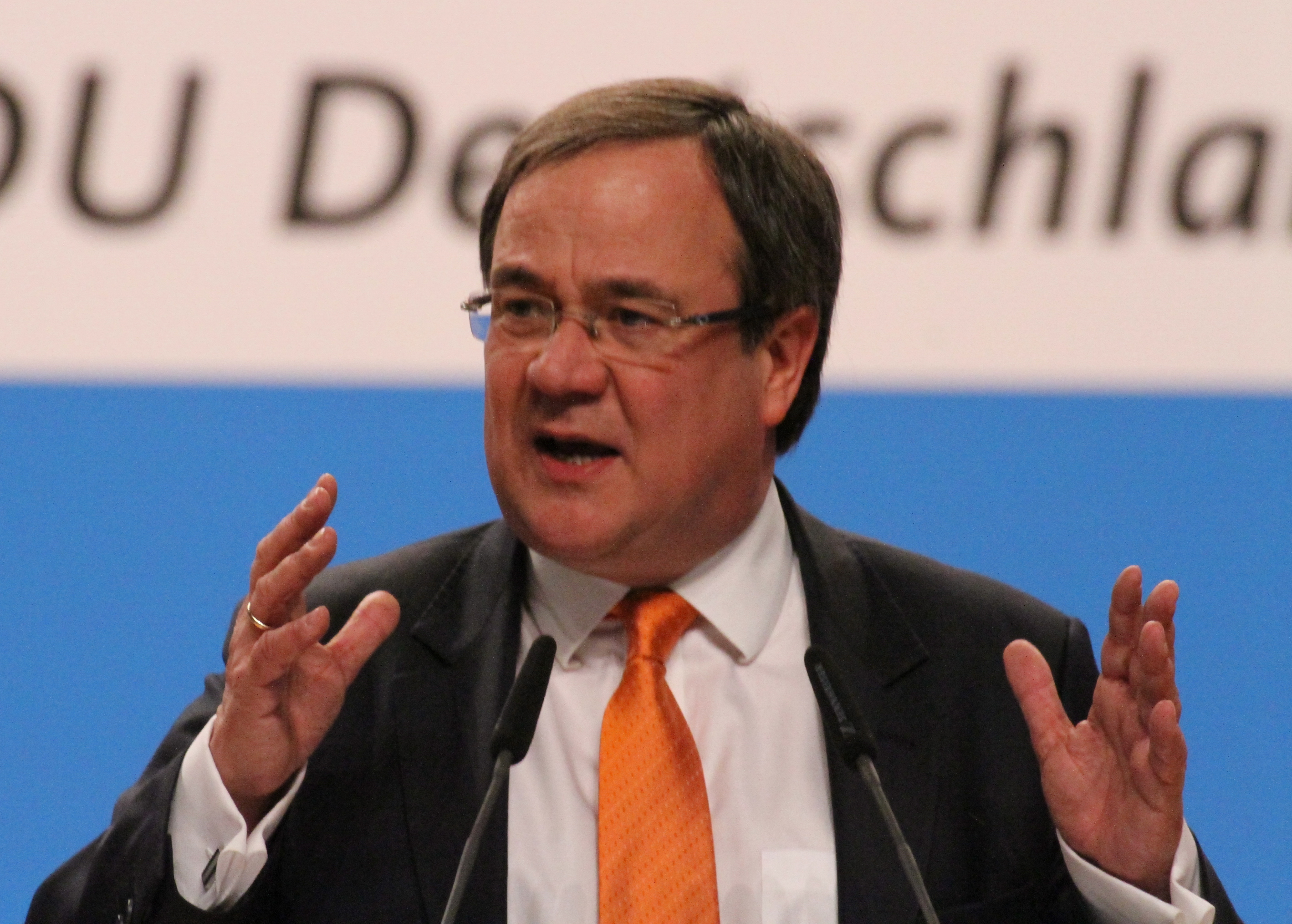 Armin Laschet auf dem CDU Bundesparteitag Dezember 2014 in Köln